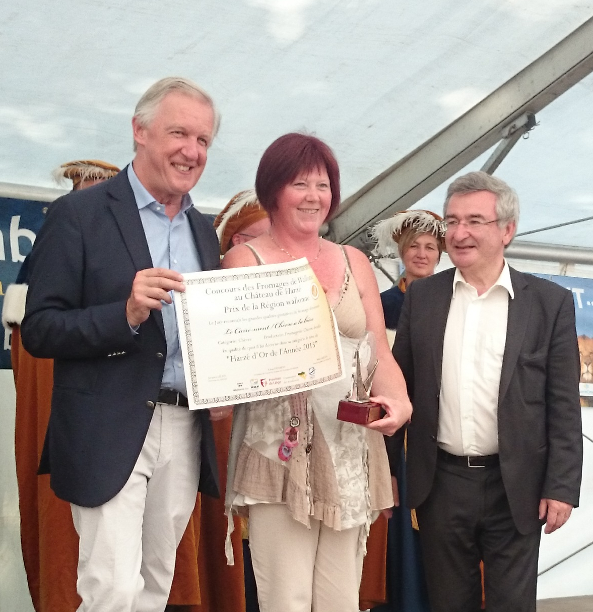 Coq d'Or 2015